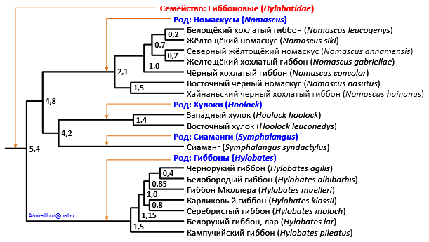 Филогенетическое дерево современных гиббоновых. Цифры в узлах дерева показывают ориентировочное время расхождения филогенетических групп (млн лет) по данным молекулярной филогенетики. Все данные по на момент создания рисунка